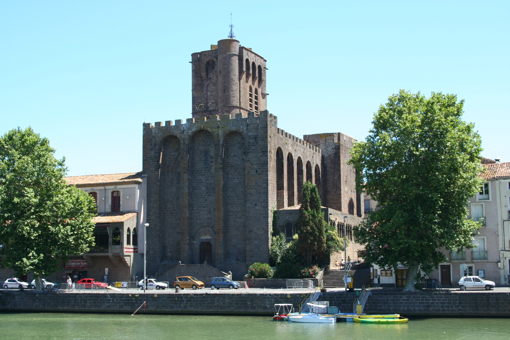 Cathédrale Saint-Étienne, Agde (Hérault, France)